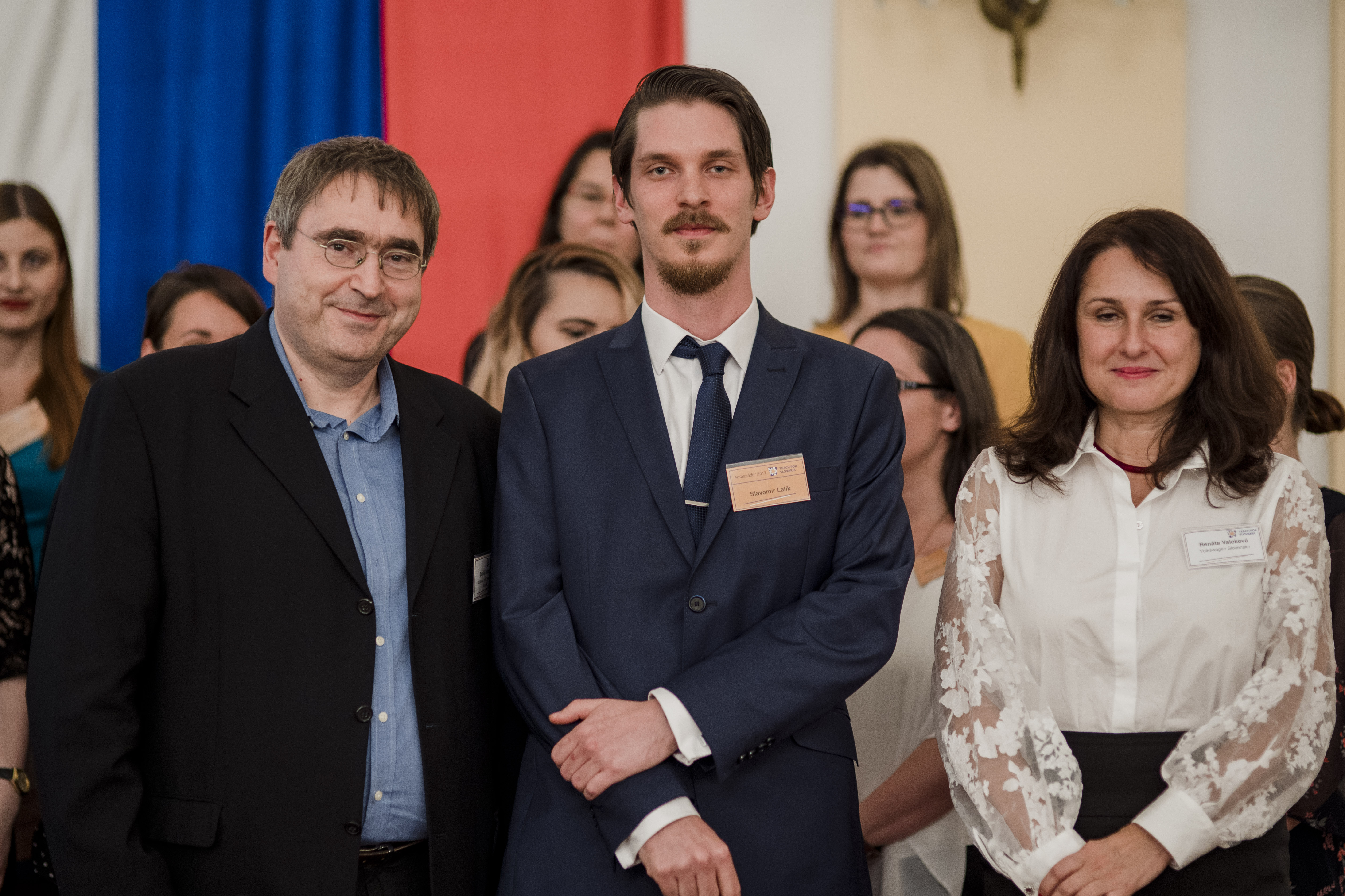 Ambasádor Slavomír Lalík pri odovzdávaní absolventského diplomu.